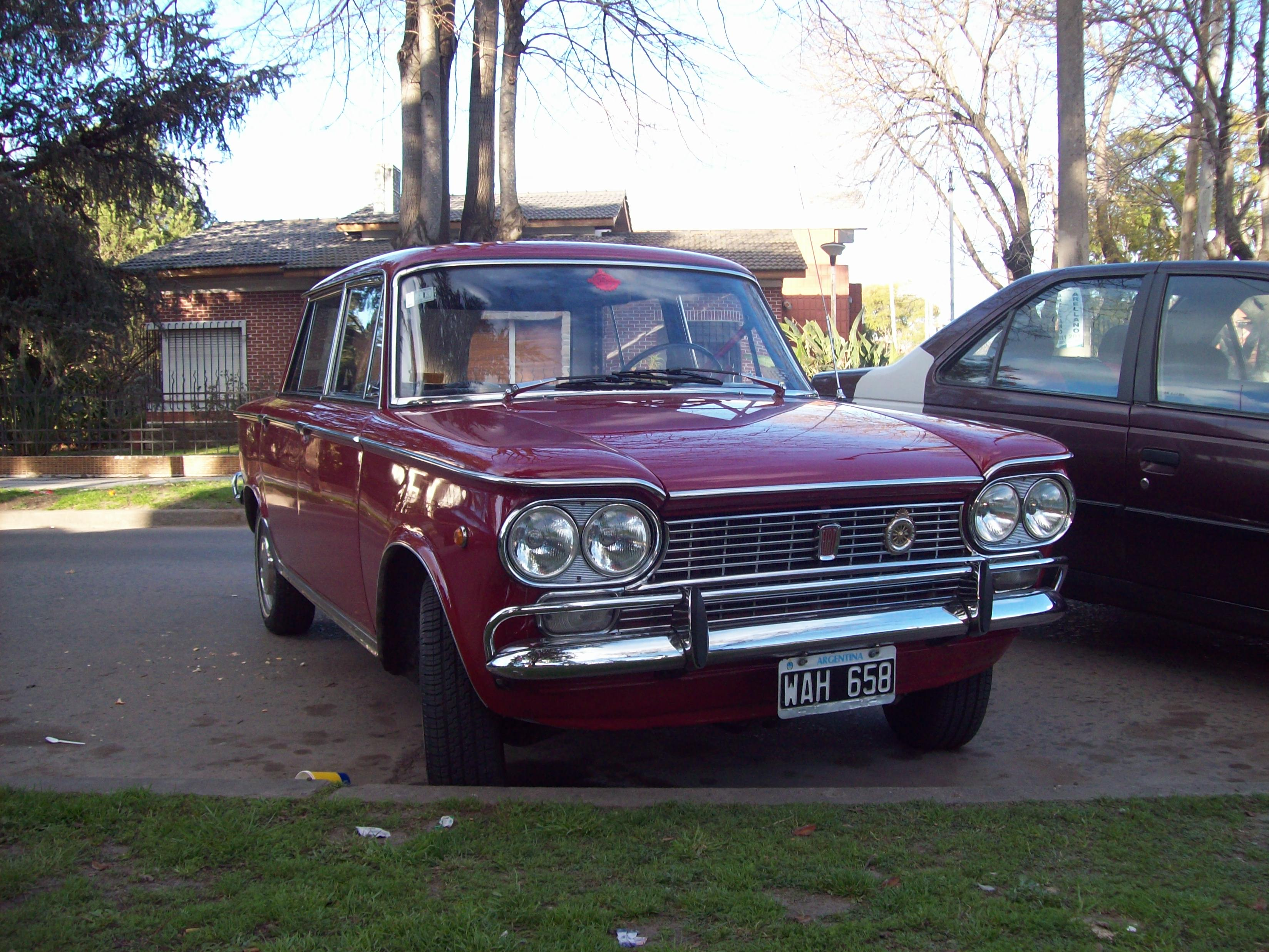 Frente del Fiat 1500.